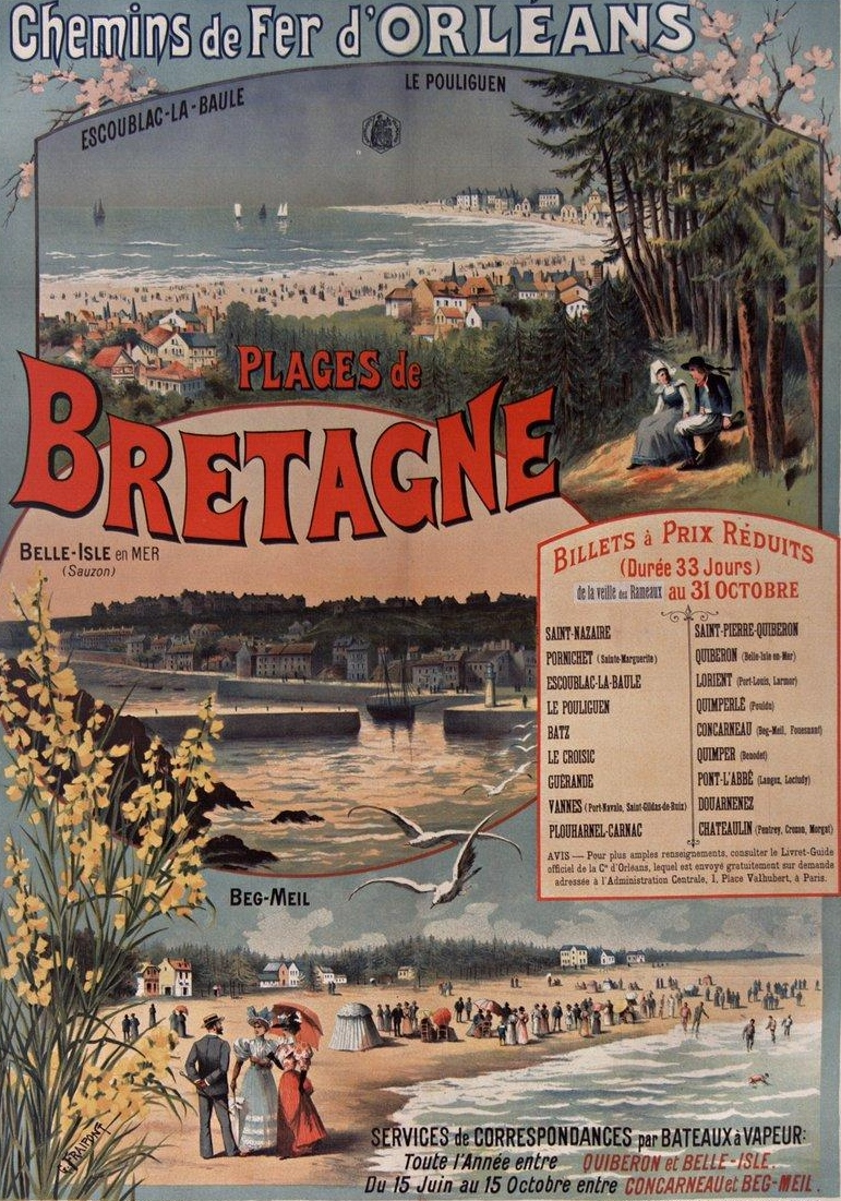 Affiche publicitaire de 1896 des Chemins de fer d'Orléans (auteur: Gustave Fraipont (1849-1923)